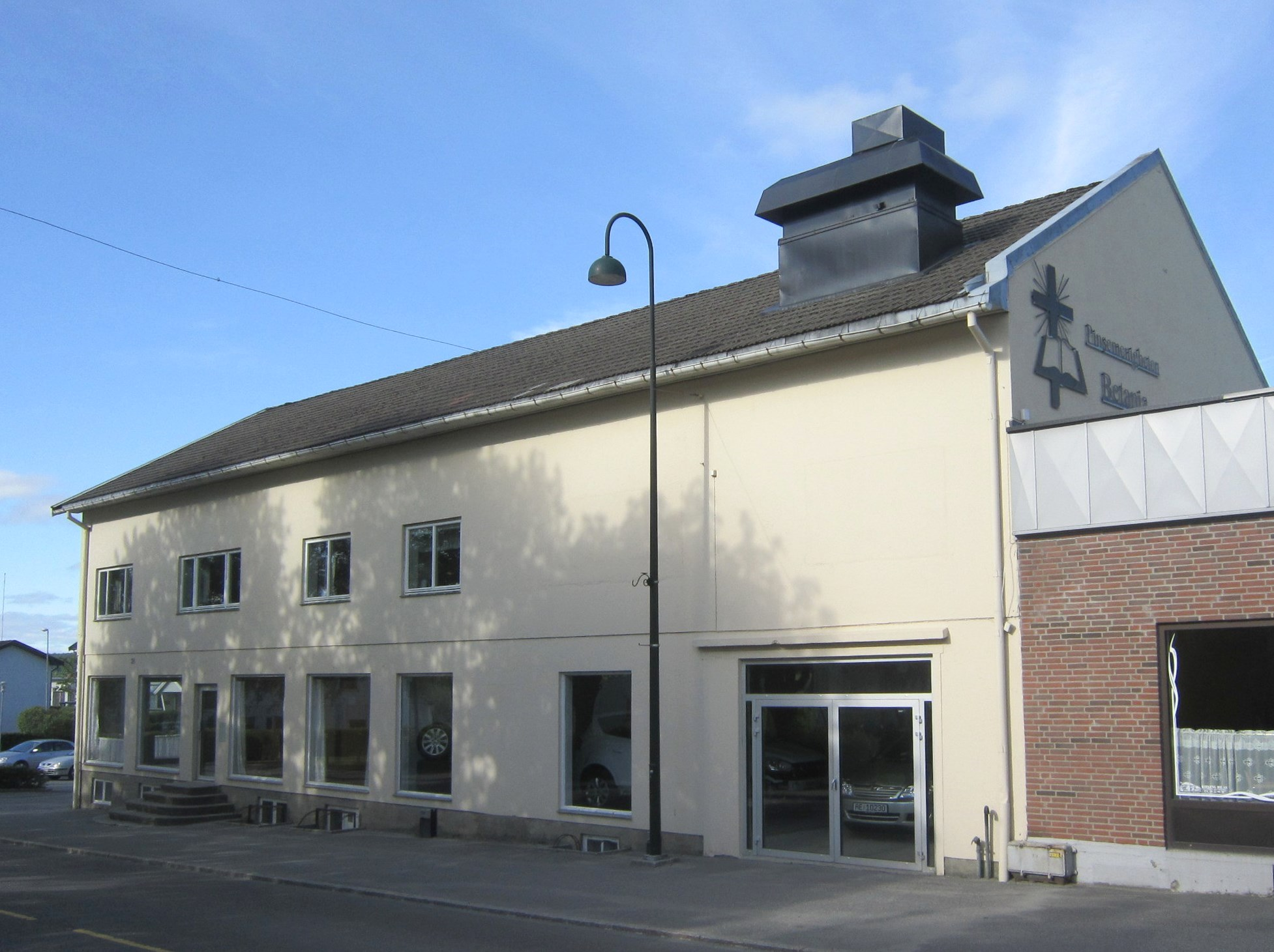 Betania Rakkestad